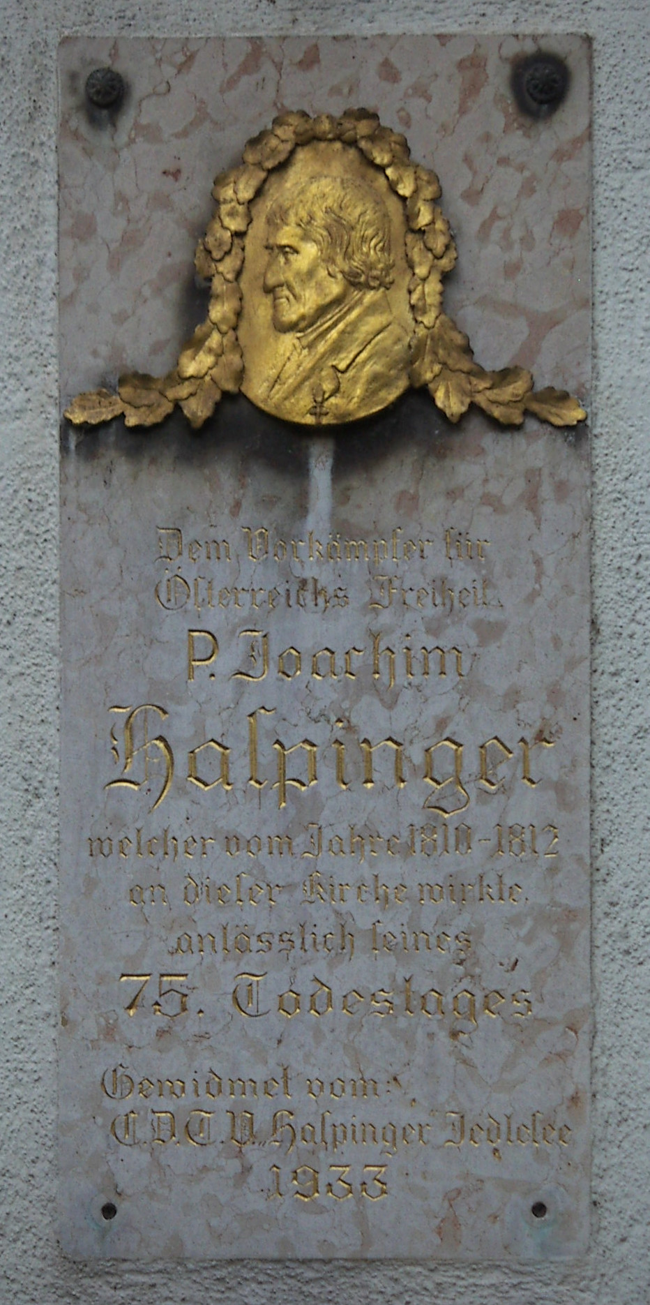 Pater Joachim Haspinger, 1776-1858, wirkte in den Jahren 1810 - 1812 in der Maria-Loretto-Kirche in Jedlesee